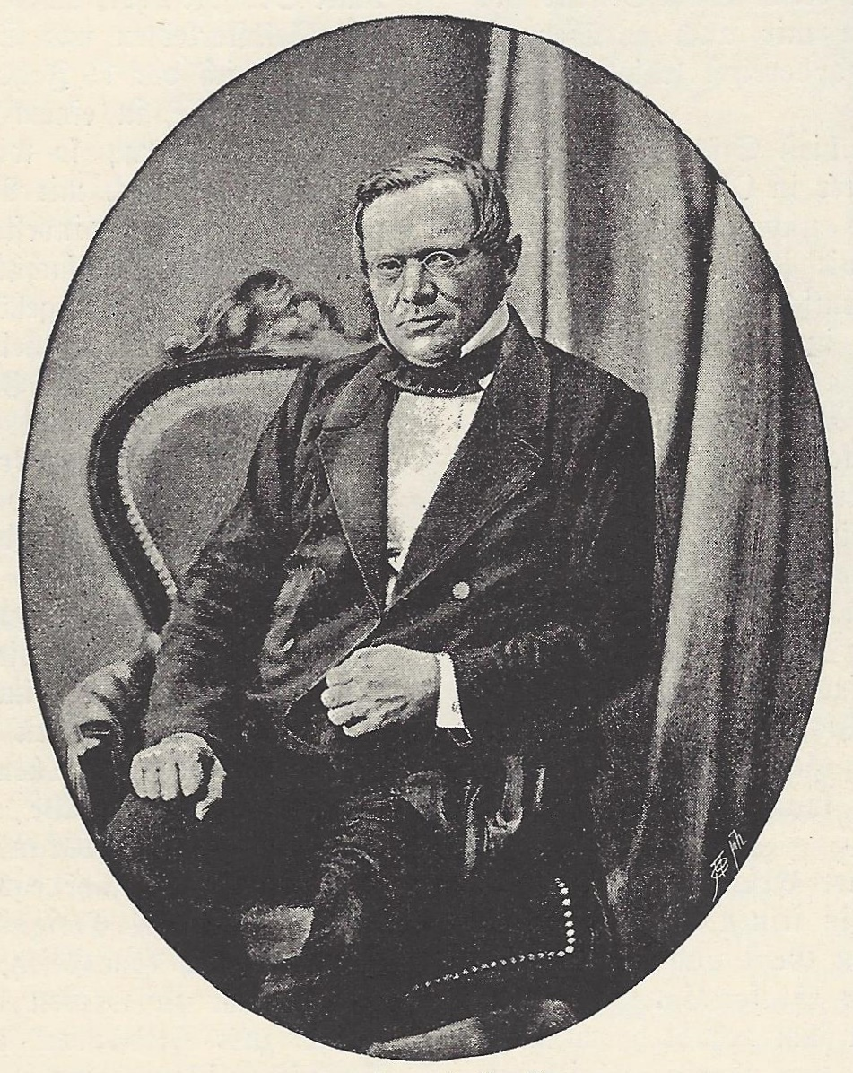 Fotografie von Ludwig Häusser